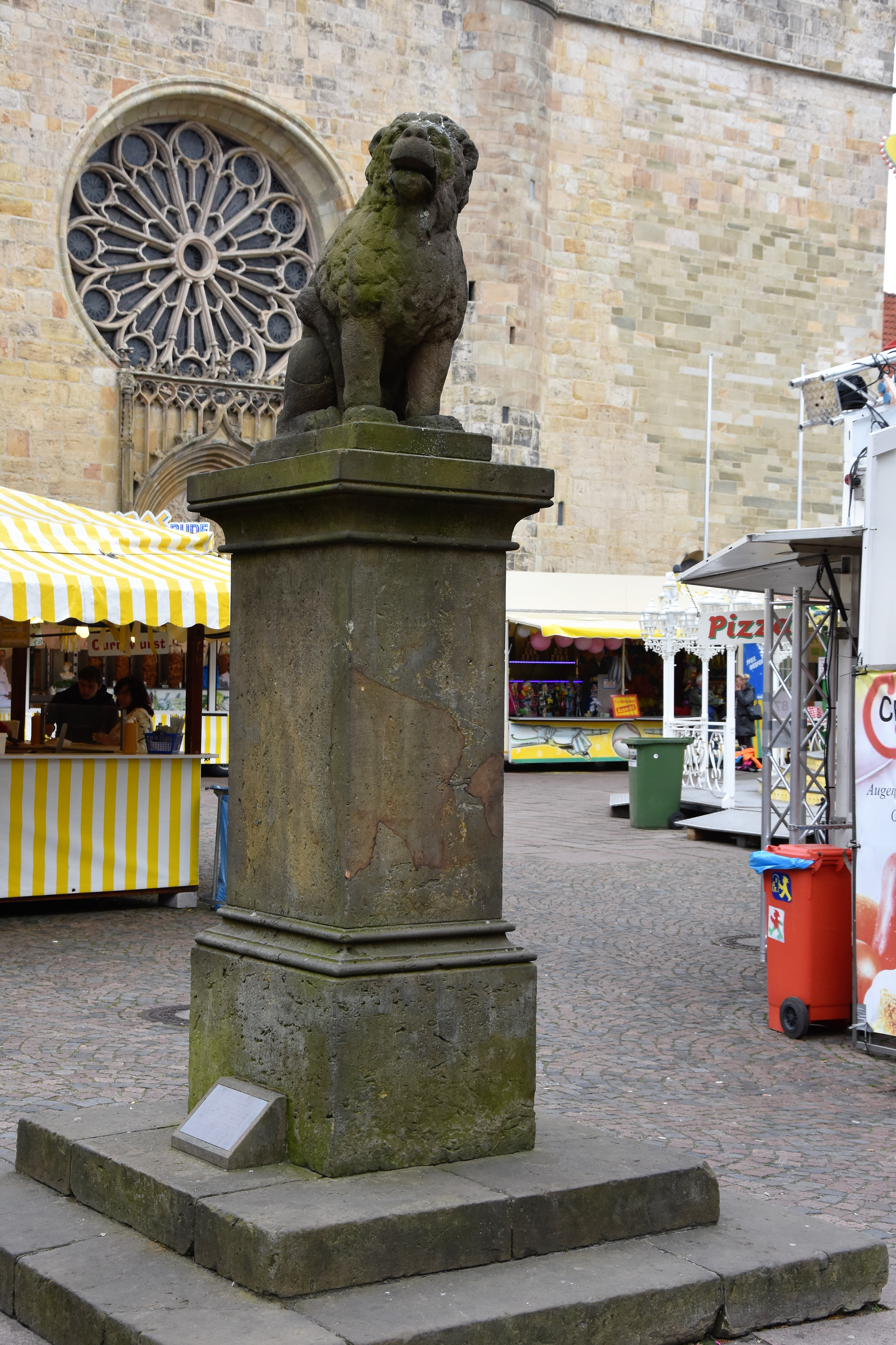 Löwenpudel Osnabrück